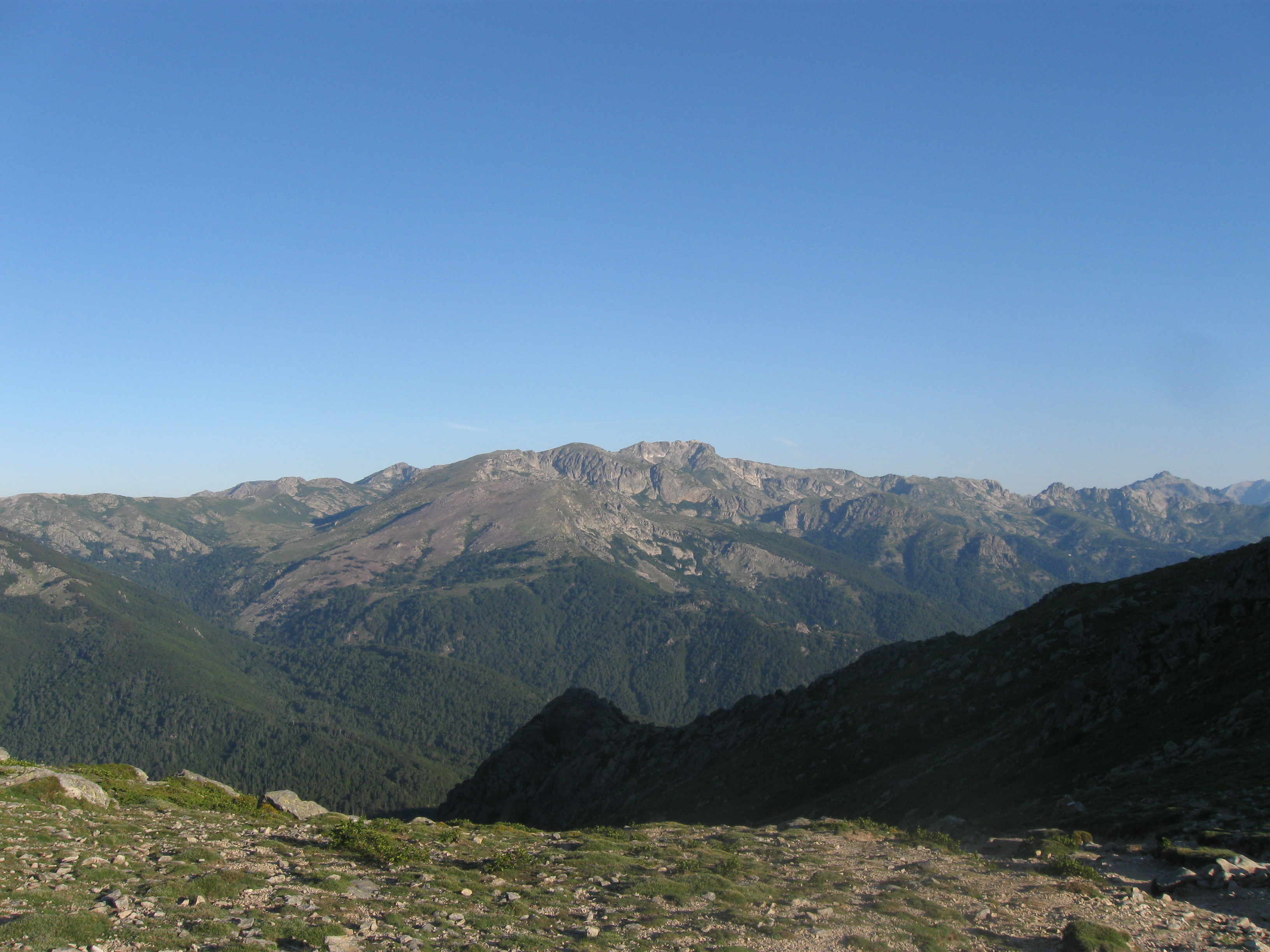 Massif du Monti Rinosu, photo prise de l'autre côté de la vallée du Taravu à Bucca d'Oru.Corsu: Massicciu di u Monti Rinosu, futugrafia presa da l'altru cantu di a valli di u Taravu in a Bucca d'Oru.